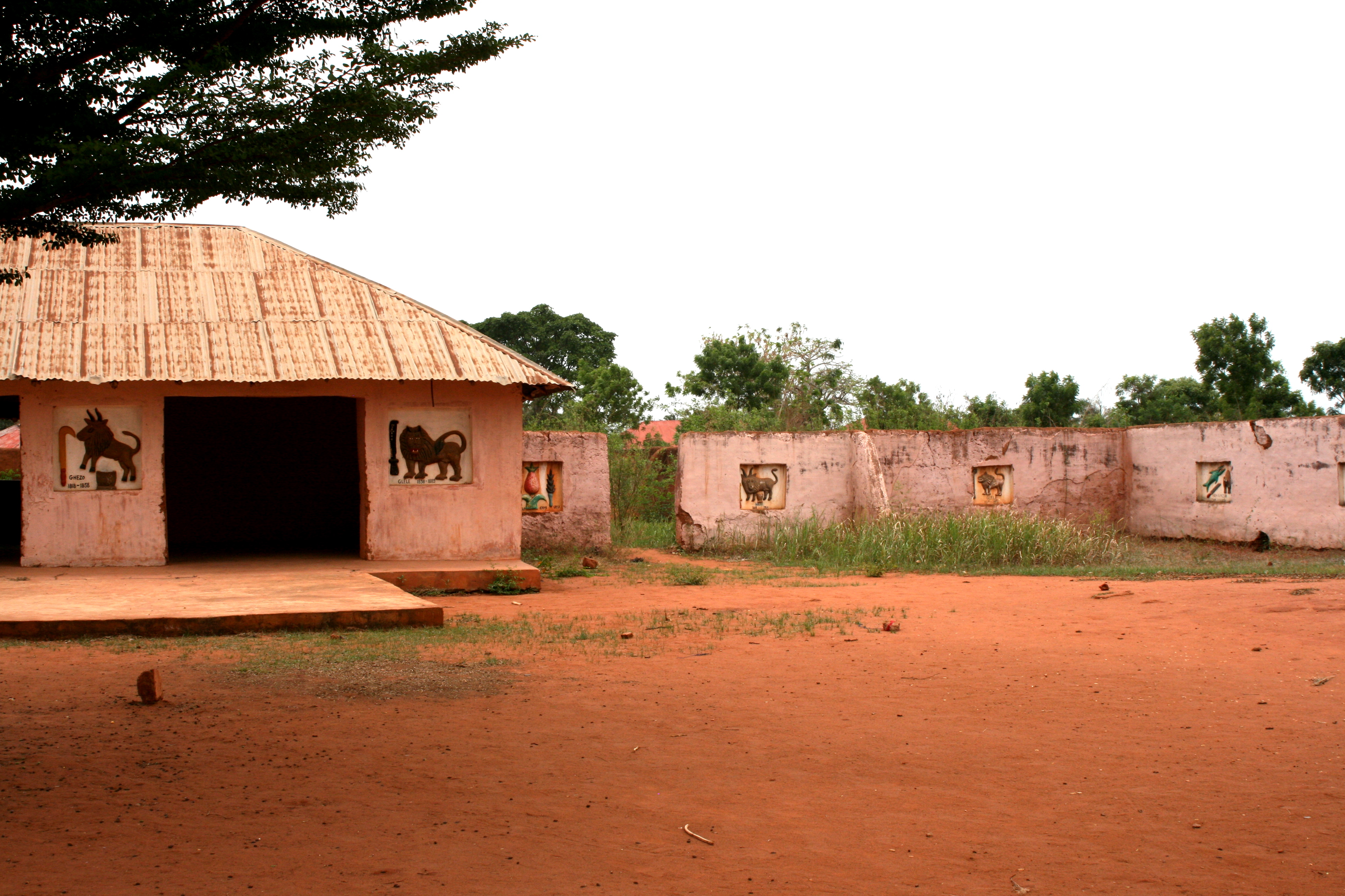 Königspalast in Abomey, Benin. Weltkulturerbe.